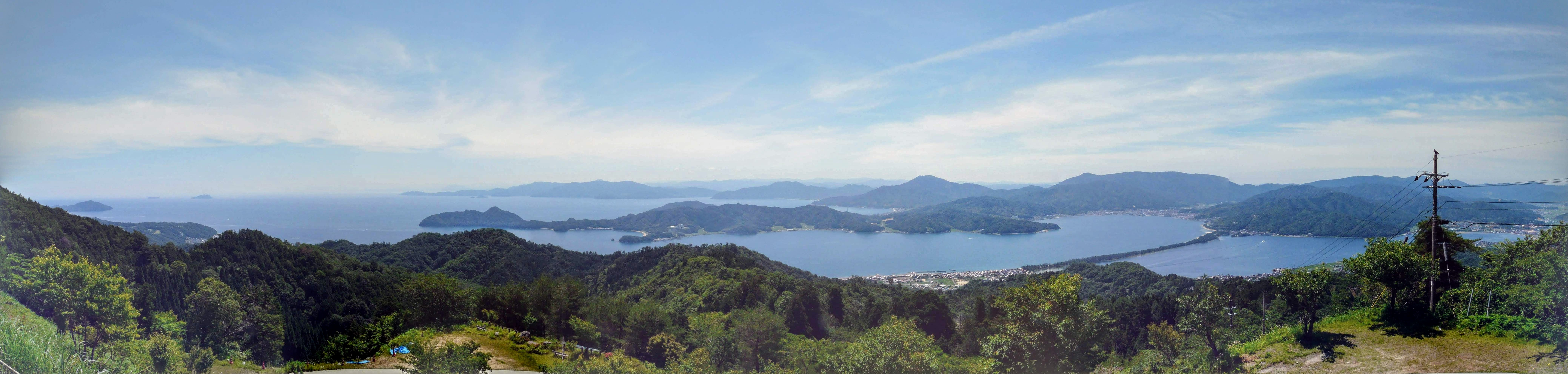 成相寺のパノラマ展望所より天橋立、宮津湾が一望できる Panasonic Lumix DMC-FZ18